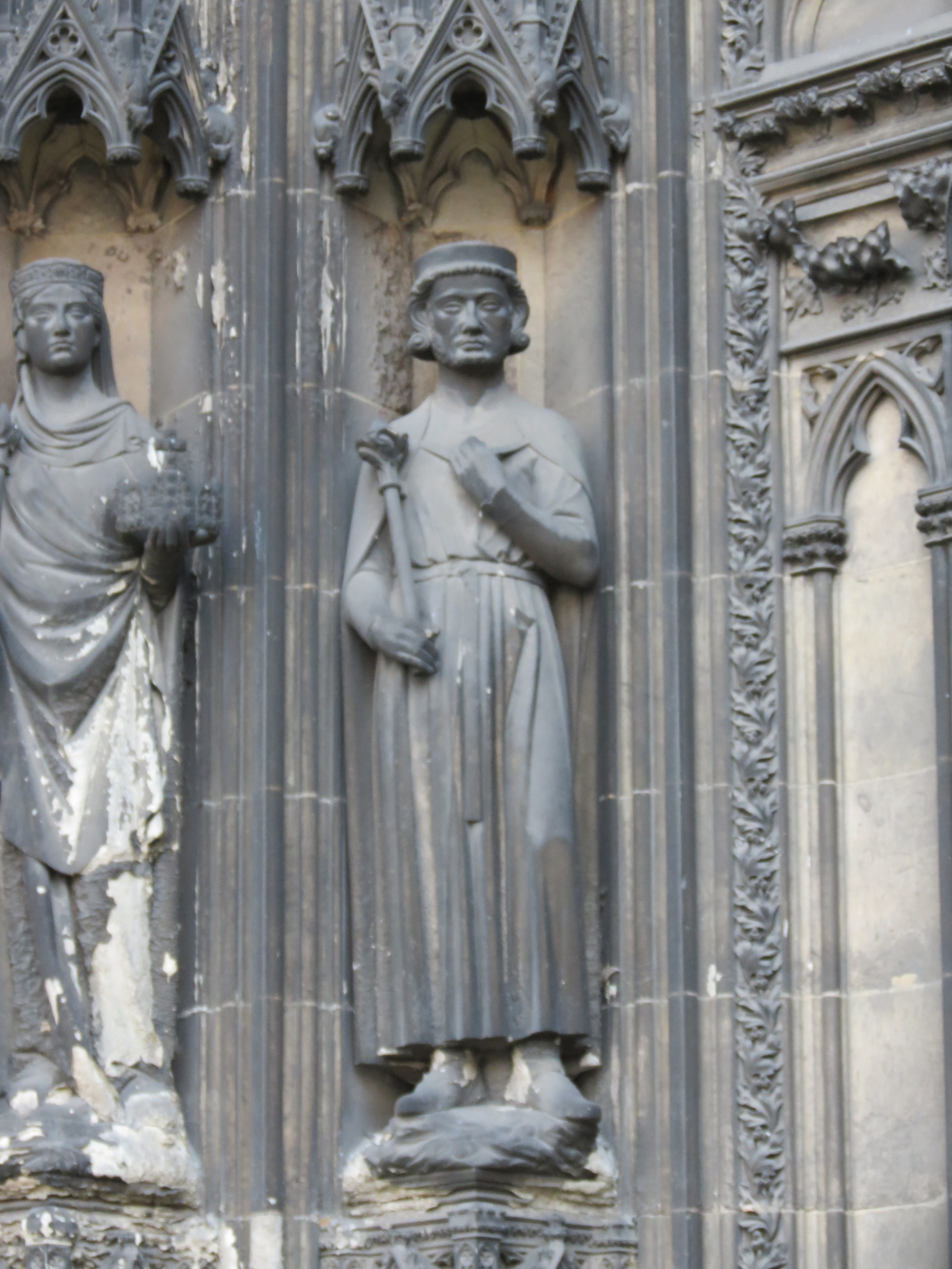 Statue sur le retour gauche de la façade occidentale de Saint-Ouen de Rouen représentant le roi Clotaire Ier.